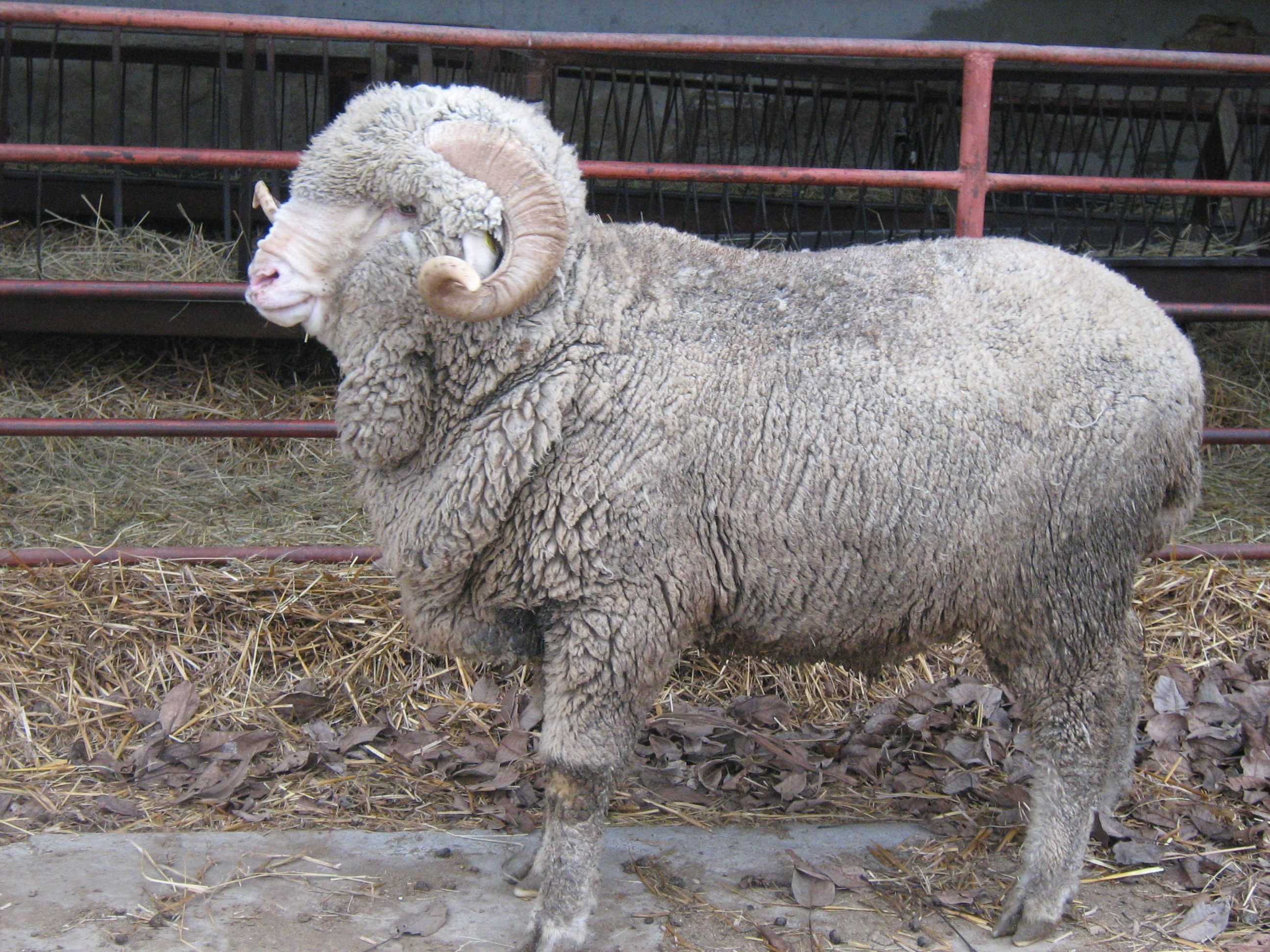 Асканийска овца